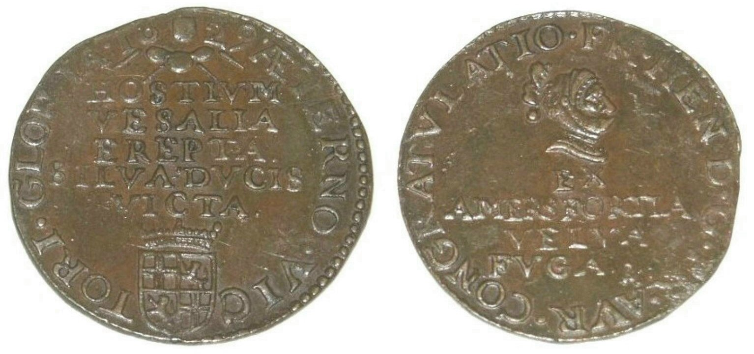 Rekenpenning 1629 Utrecht, veroveringen van Frederik hendrik. Foto van eigen exemplaar.